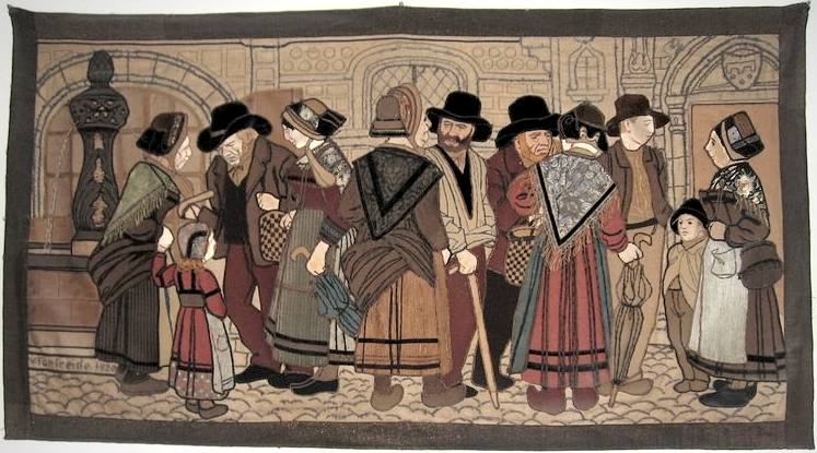 Tapisserie de Victor Fonfreide + depuis plus de 70 ans.